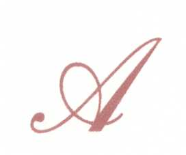 das Große A